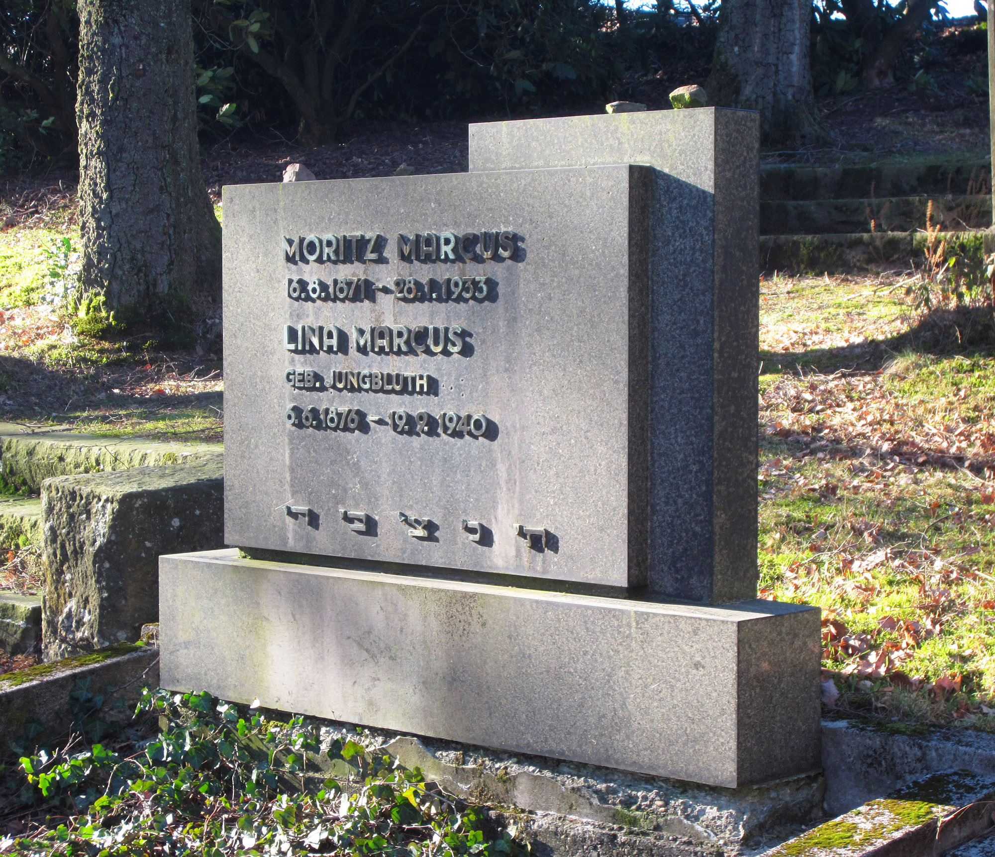 Jüdischer Friedhof Schwelm, Grabstein Moritz Marcus (1933) und Lina Marcus (1940); Stein gestaltet und signiert von Bildhauer Leopold Fleischhacker aus Düsseldorf